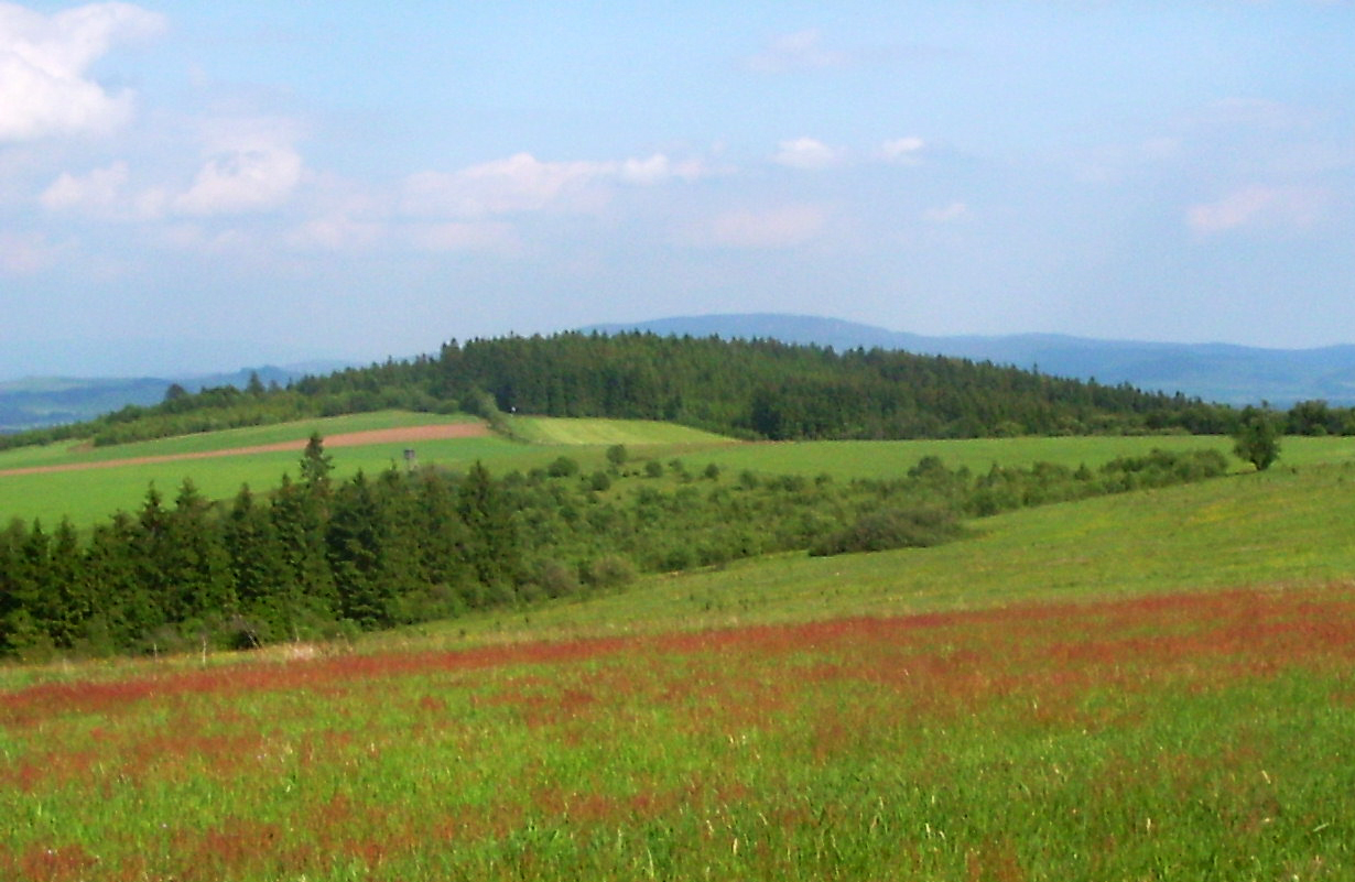 Wzniesienie graniczne w południowo-zachodniej Polsce w Sudetach Środkowych, w Górach Bystrzyckich, w województwie dolnośląskim.